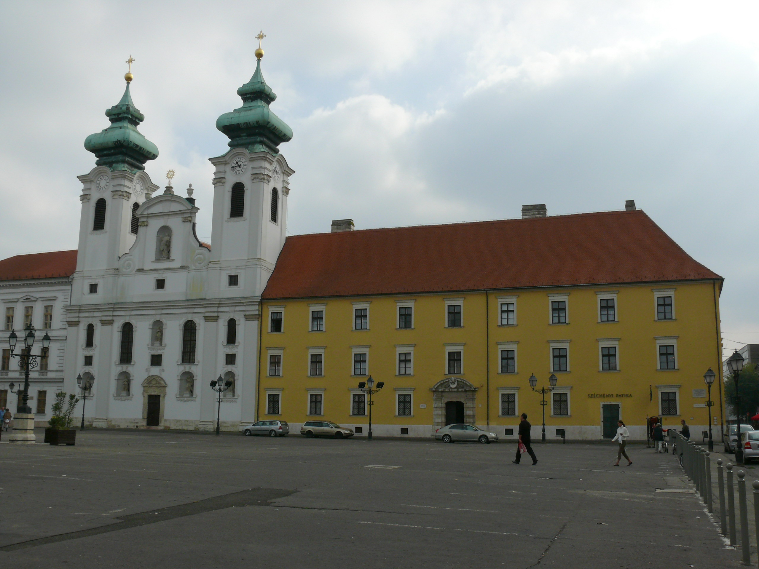 A bencések épületegyüttese a győri Széchenyi téren